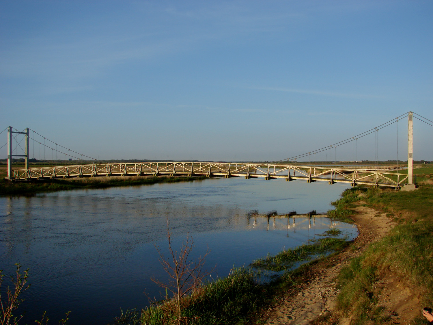 Træbroen ved Omme å